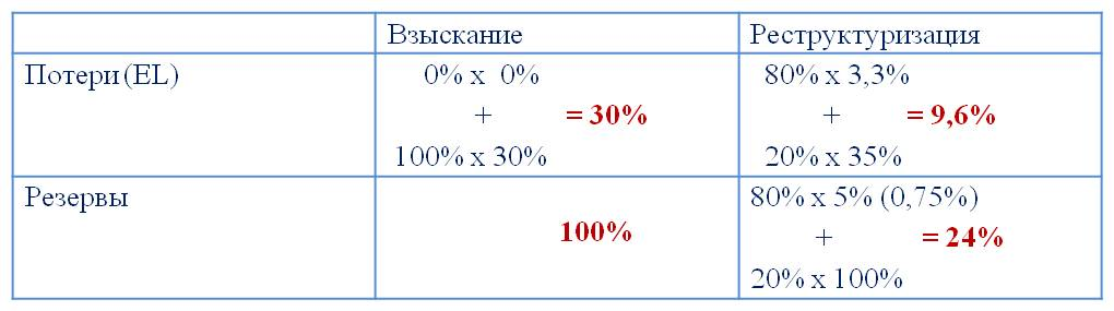 Экономика реструктуризации